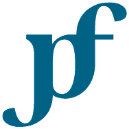 Logo Pravne fakultete Univerze v Mariboru